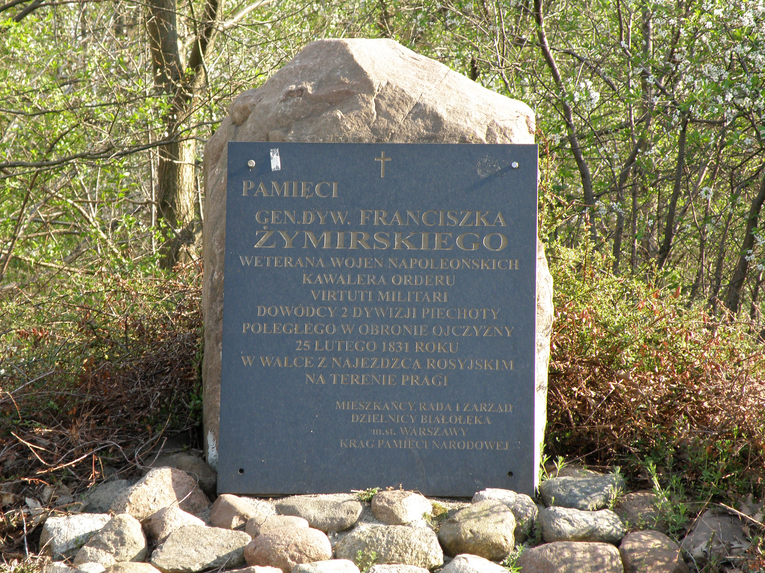 Olszynka Grochowska - Aleja Chwały, ul. Traczy. Głaz pamięci gen. dyw. Franciszka Żymirskiego.